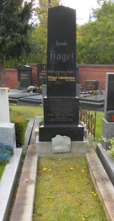 Heiligenstädter Friedhof-Michael Guttenbrunner